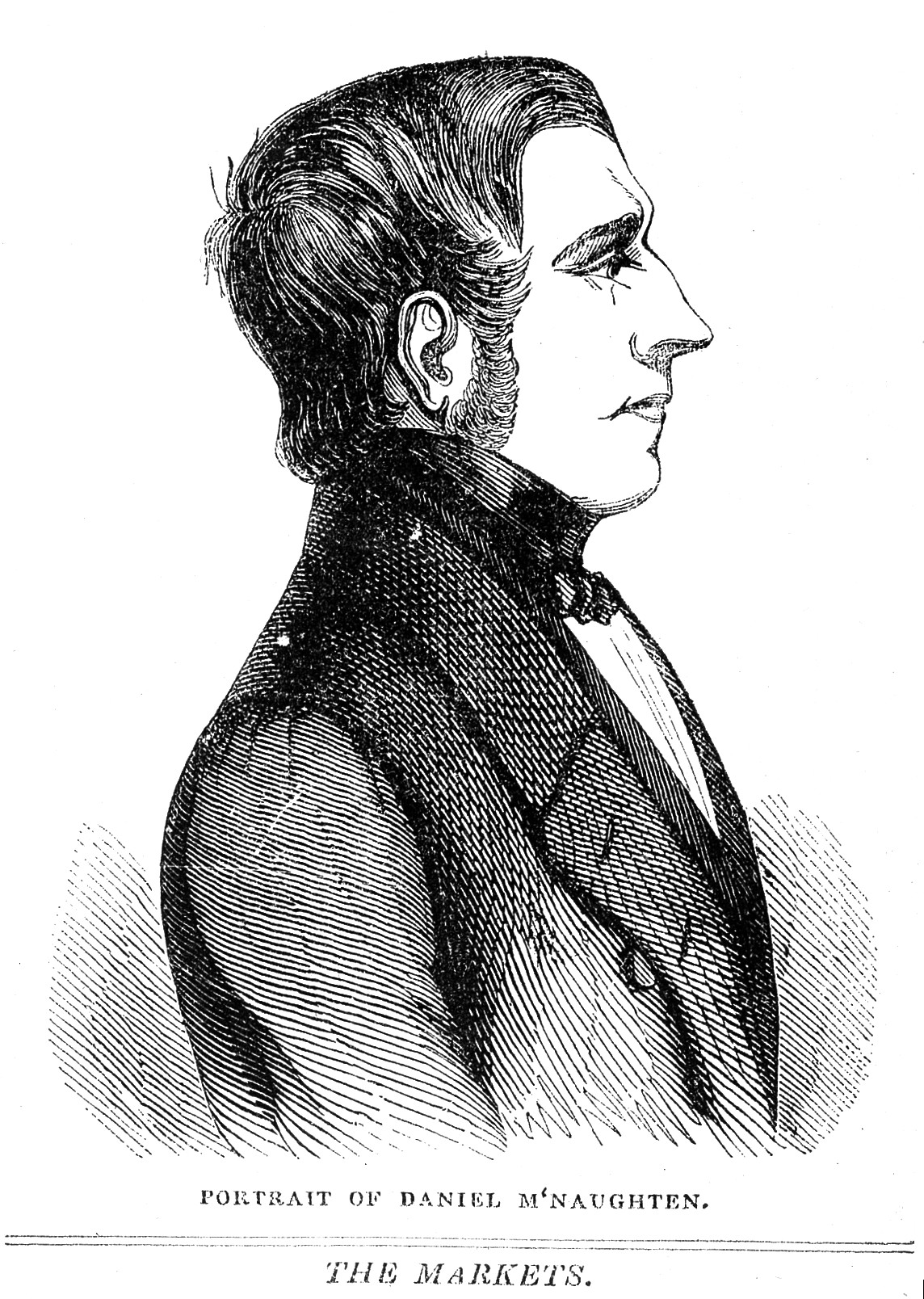 Daniel McNaughton, Insane Murderer Rare Books Keywords: Insanity; murderer; Daniel McNaughton